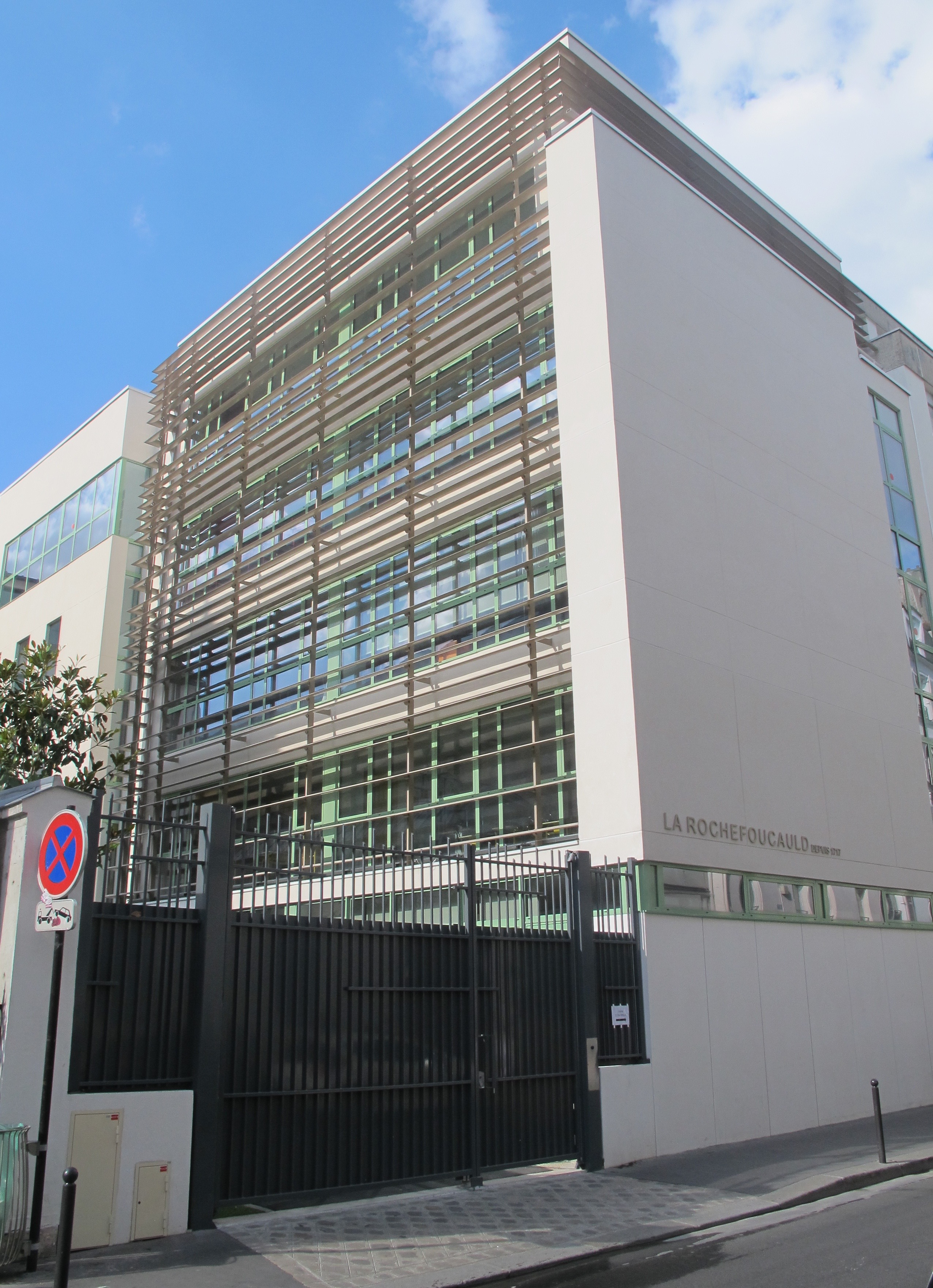 École, collège, lycée La Rochefoucauld, sortie rue Saint-Dominique (Paris, 7e).